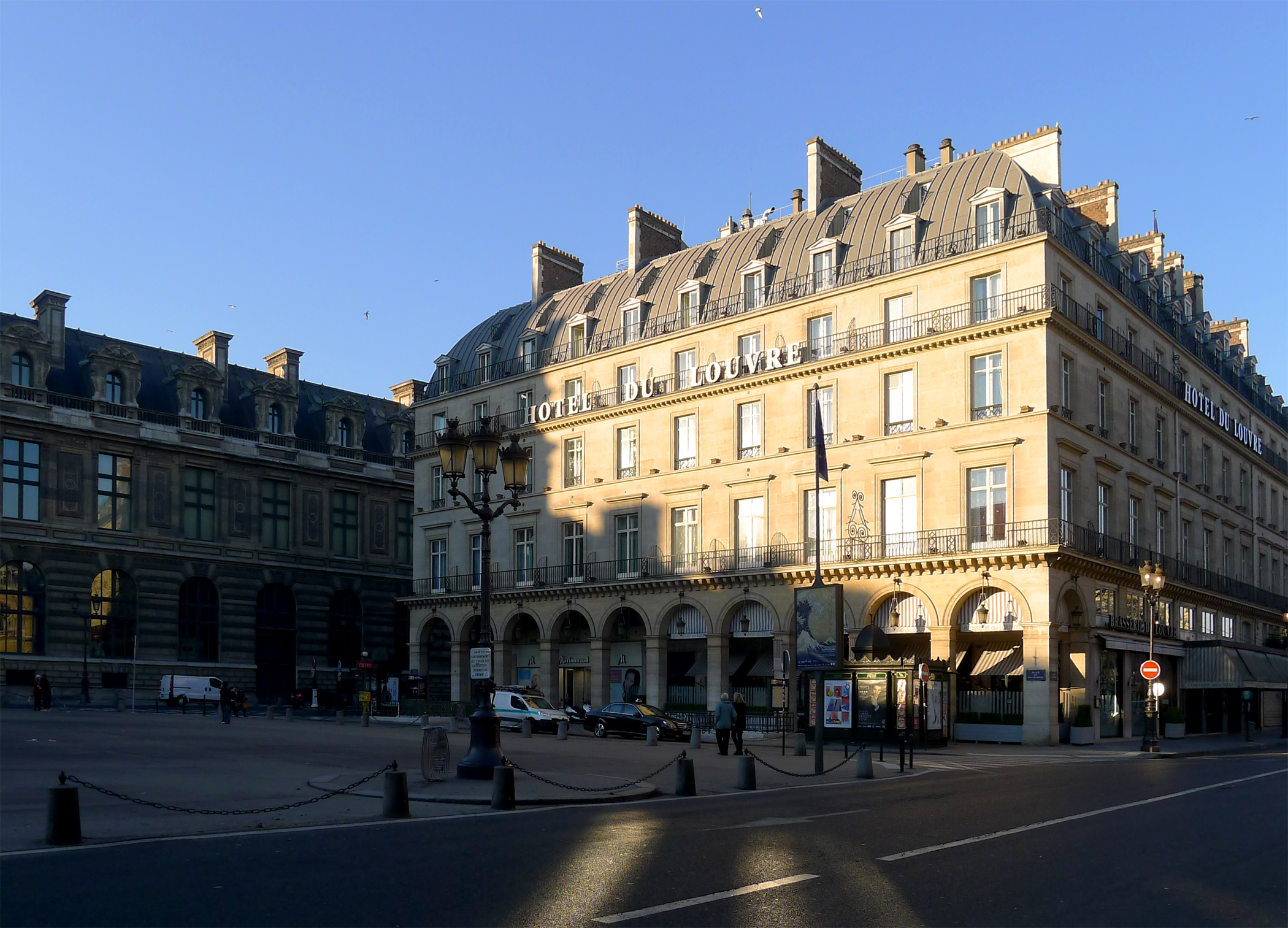 Place du Palais-Royal, Paris Ier. Sur la droite l'Hôtel du Louvre, sur la gauche, la place du Palais-Royal et le palais du Louvre.